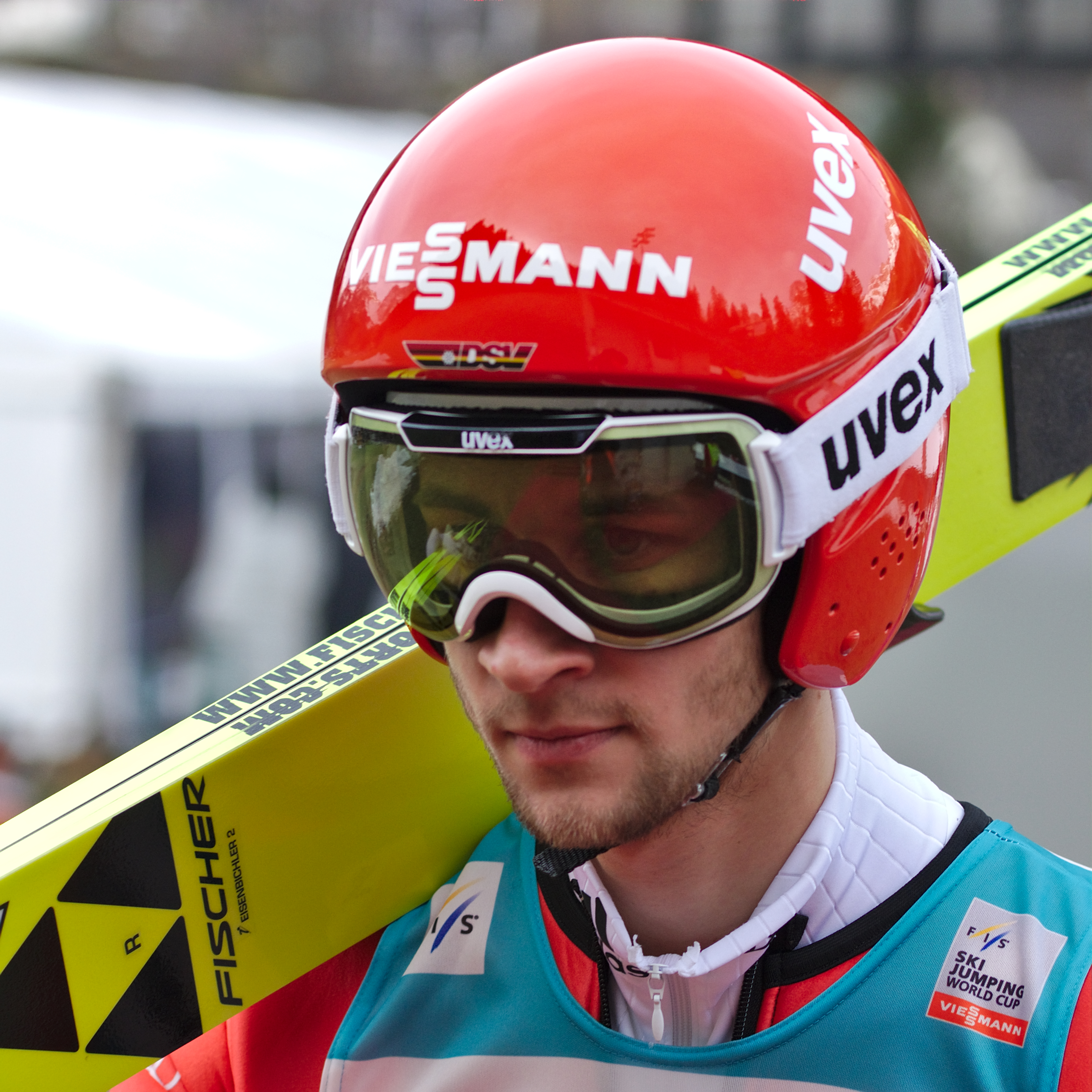 FIS Ski Jumping World Cup 2014 - Engelberg - 20141221 - Markus Eisenbichler